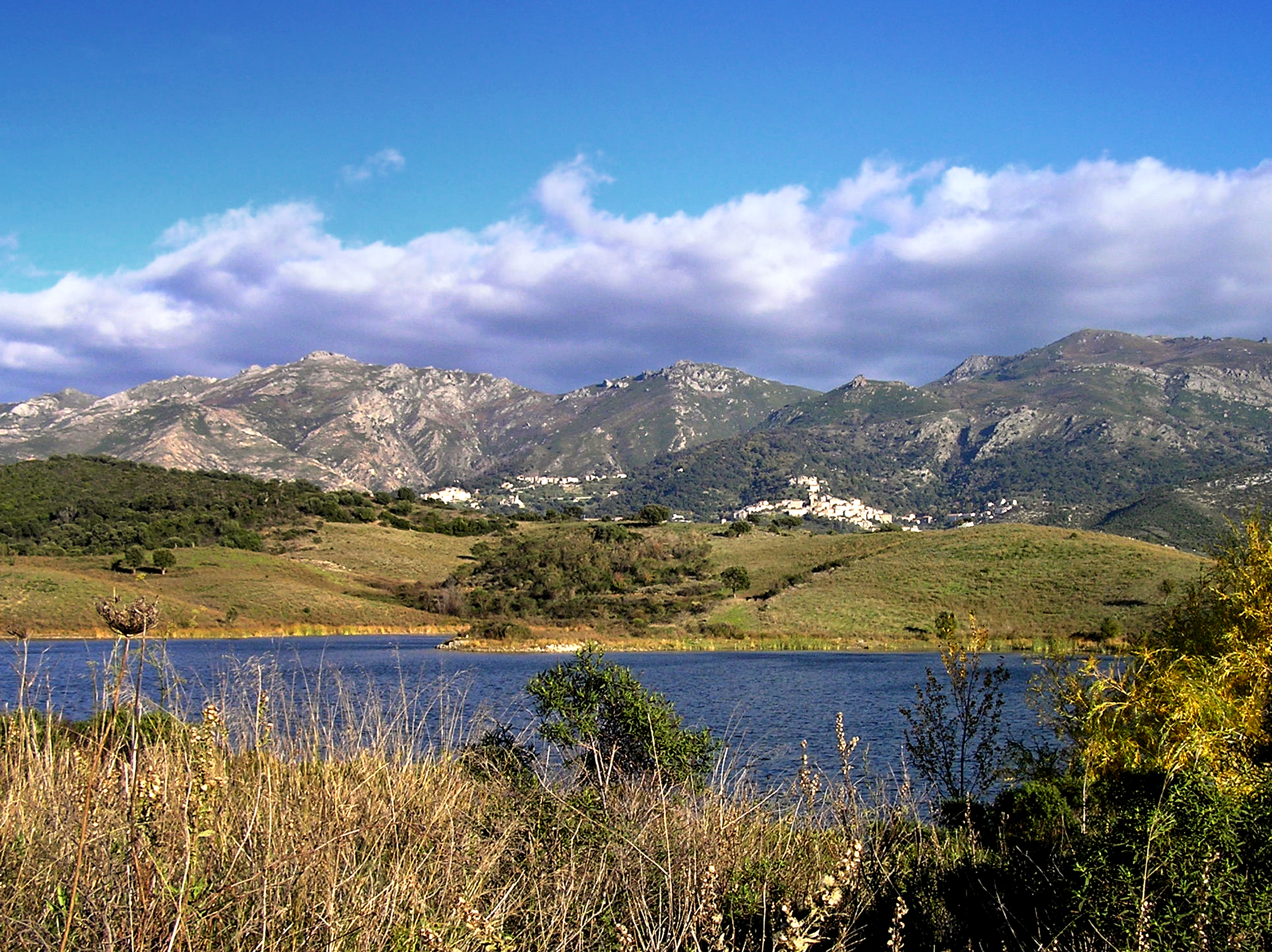 Oletta (Corse) - Lac de Padula